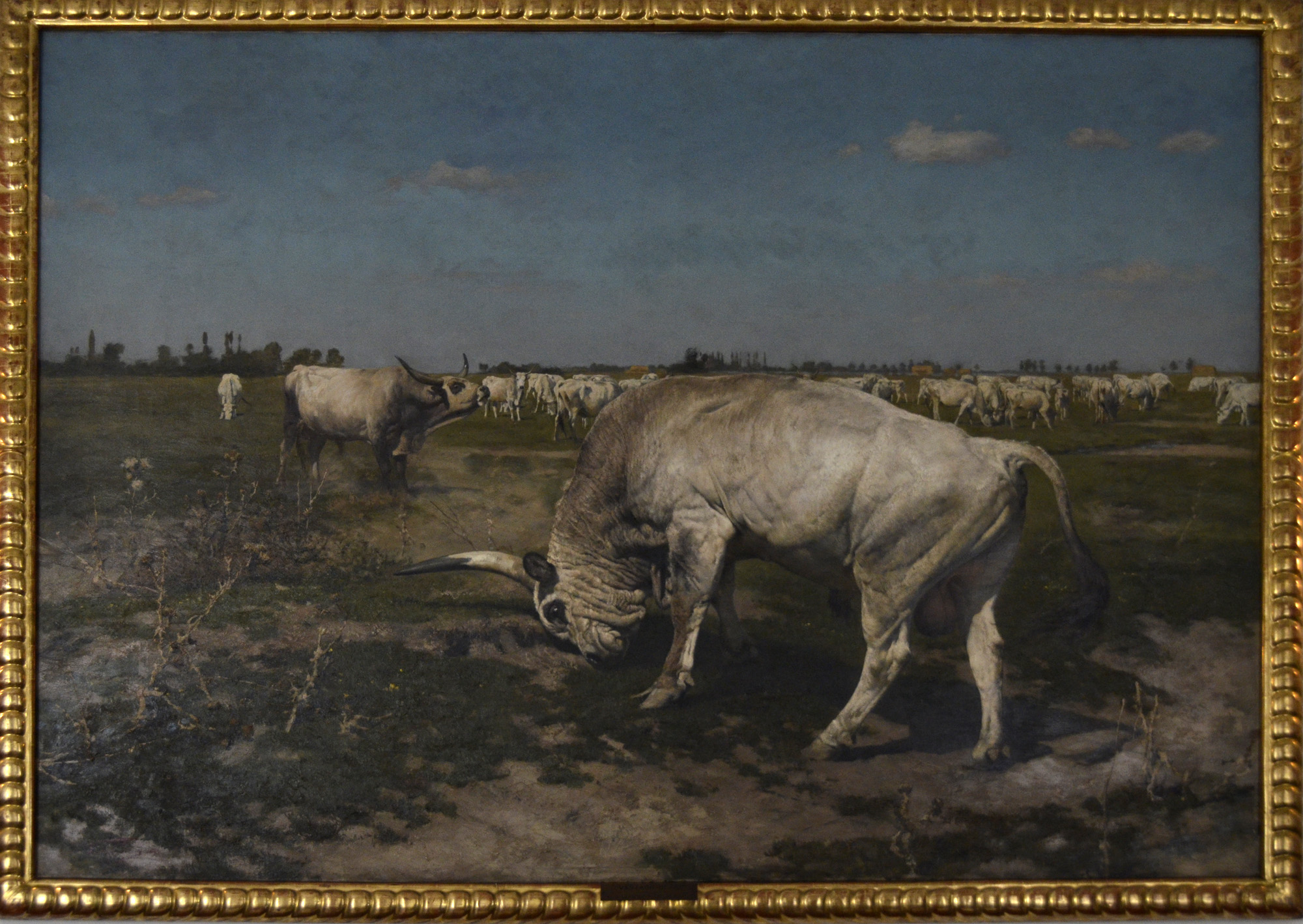 Ki a legény a csordában?